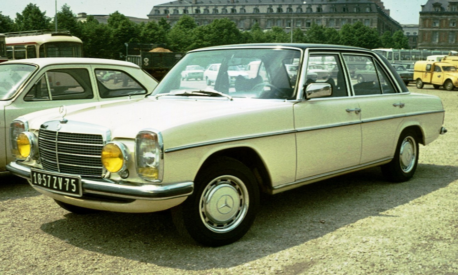 Mercedes Benz 250 post 1973 facelift